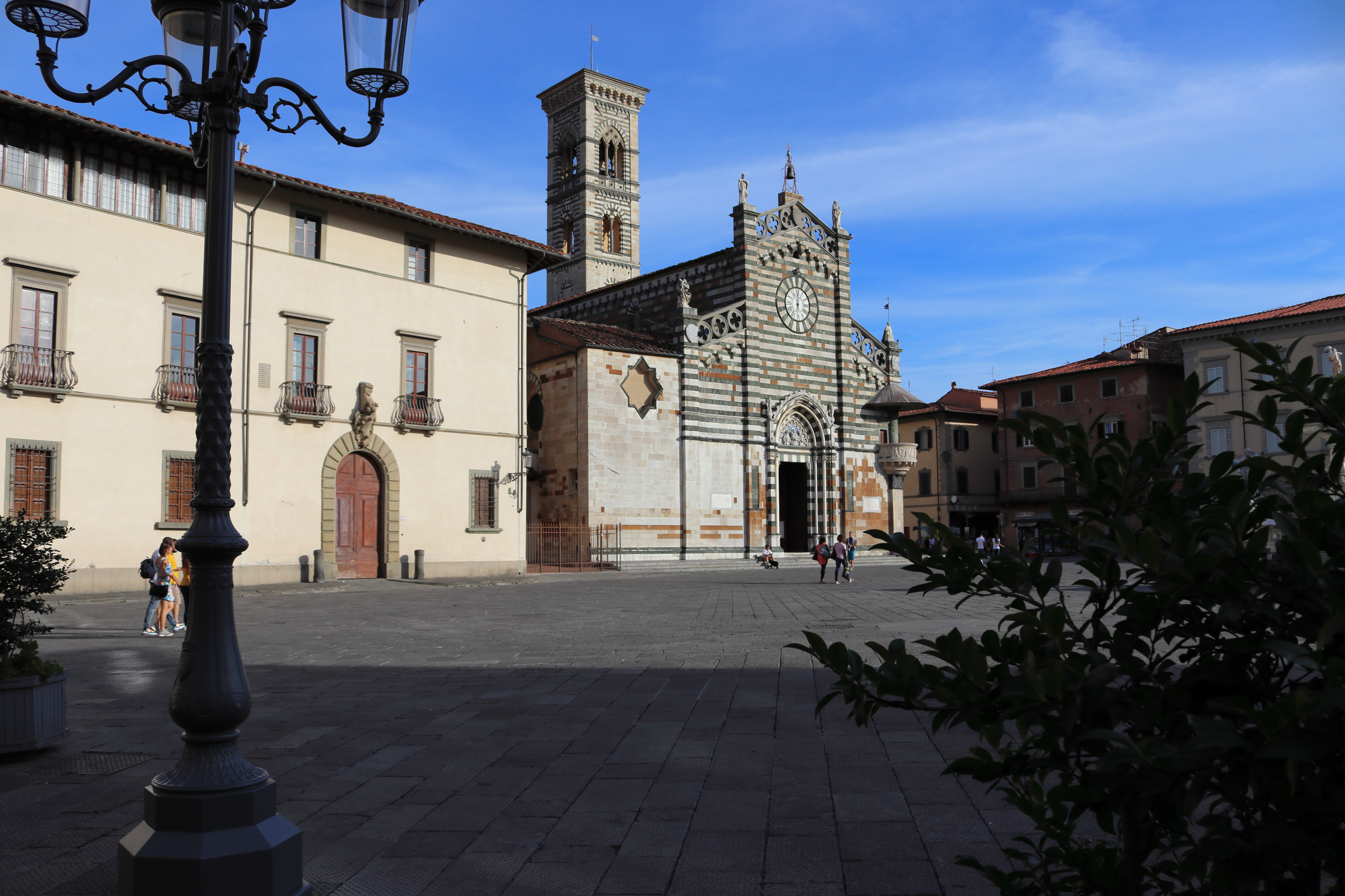 Piazza del Duomo, Prato This is a photo of a monument which is part of cultural heritage of Italy.